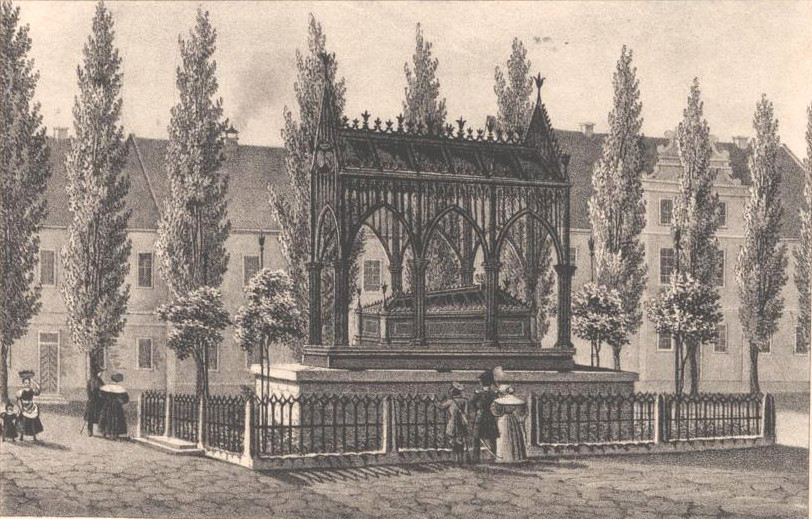 Luisendenkmal in Gransee, Lithographie : 18 x 11 cm, Heinrich Wilhelm Teichgräber